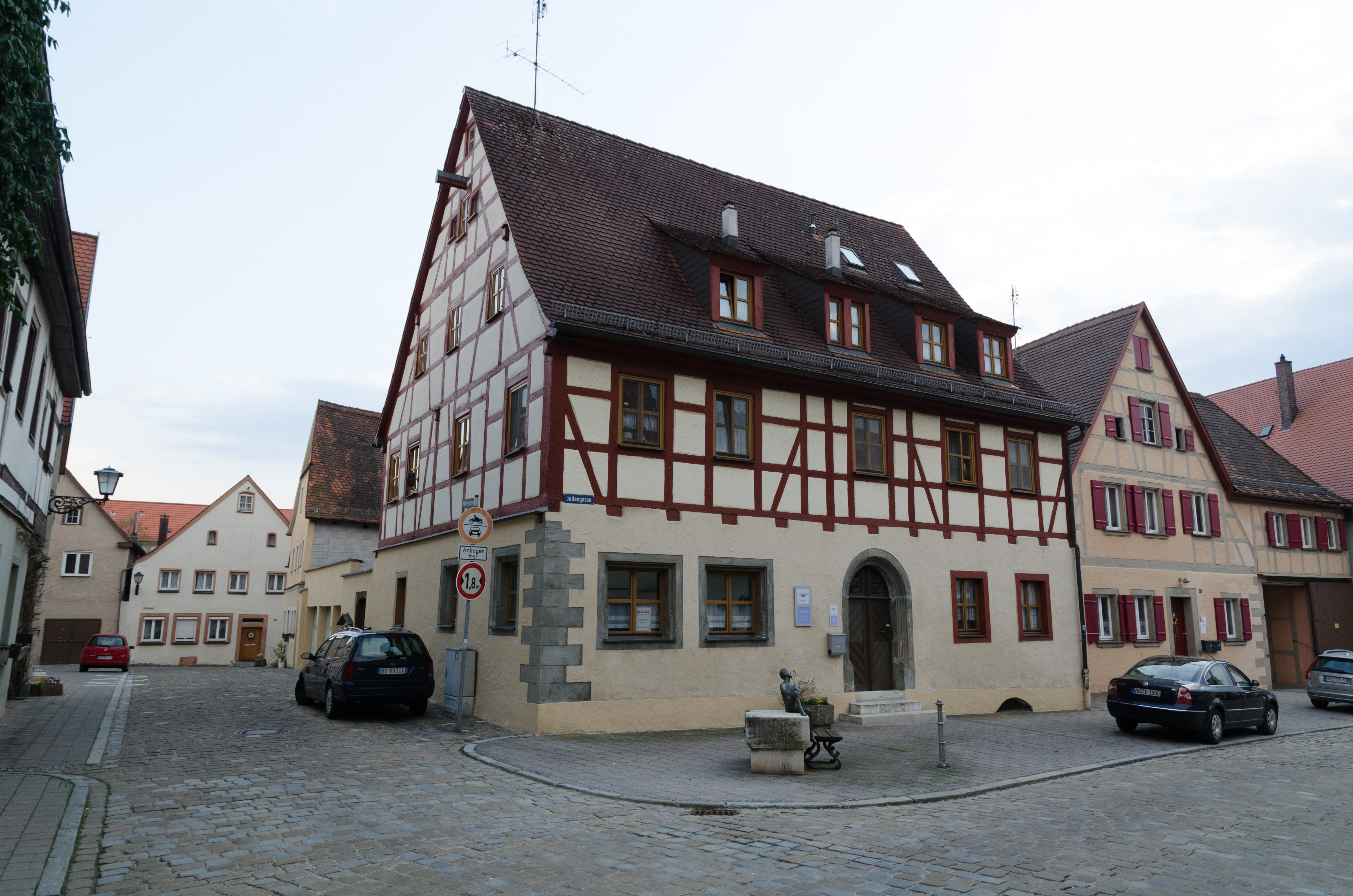 Weißenburg, Judengasse 27, 29